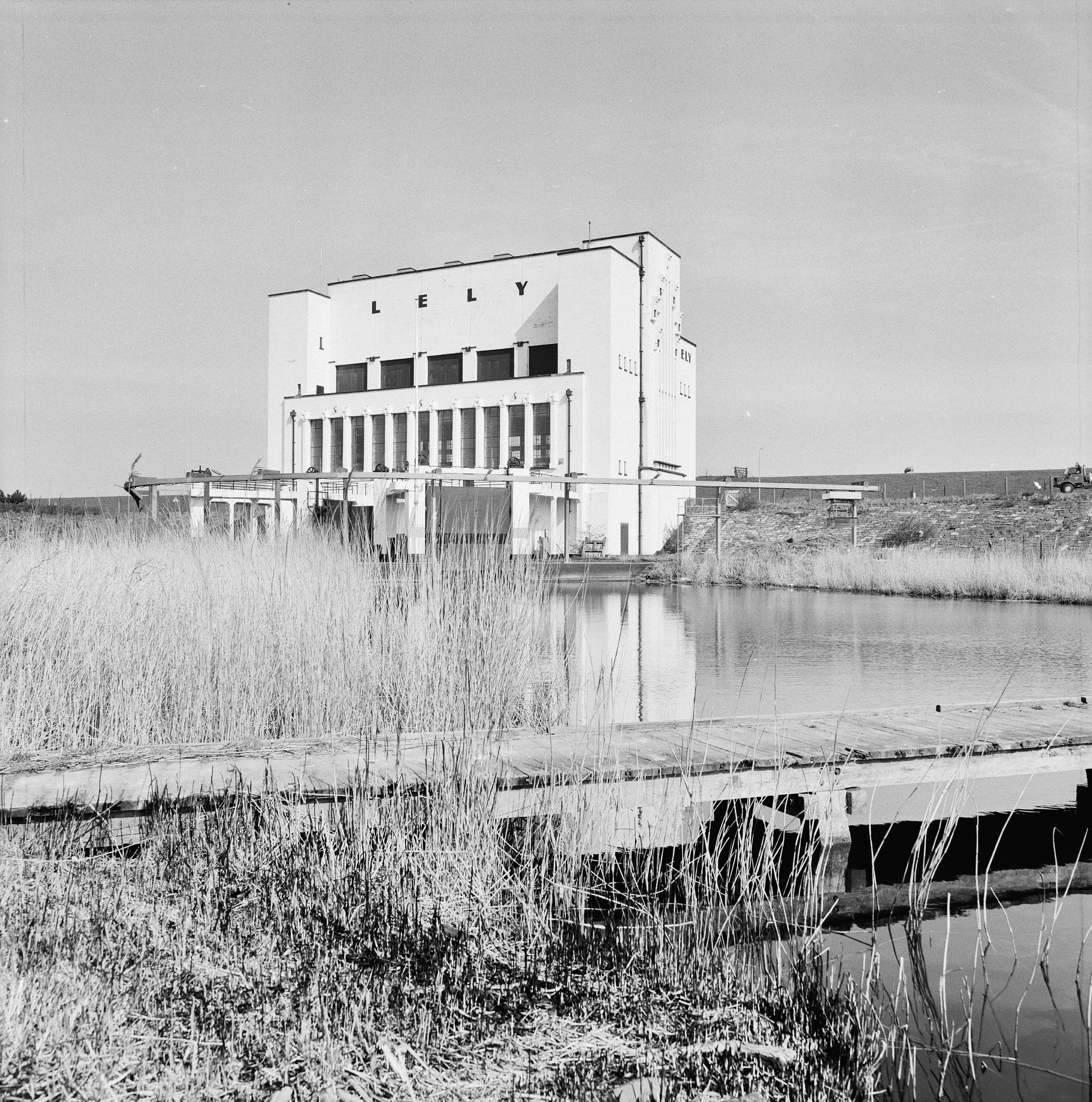 GEMAAL LELY: Exterieur OVERZICHT (opmerking: Gefotografeerd voor MIP Noord-Holland)